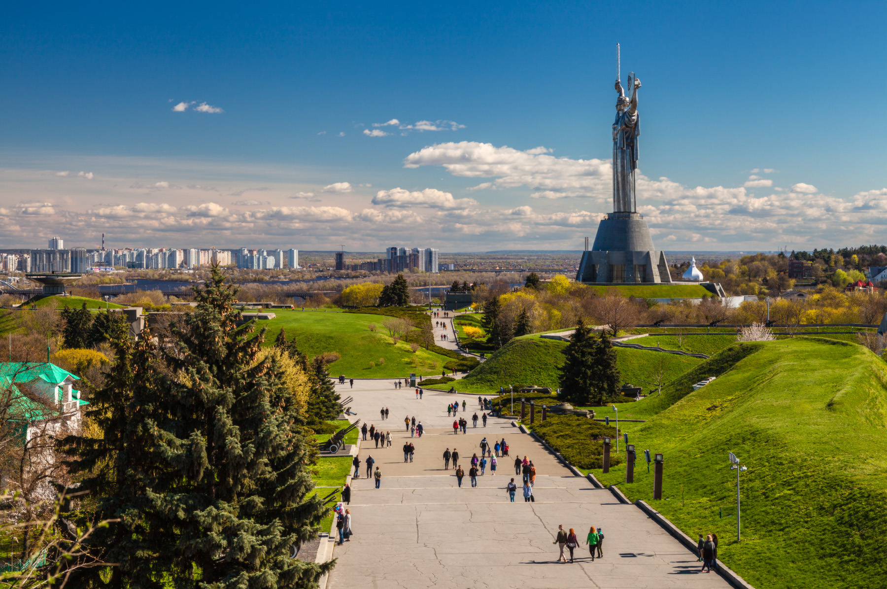 Печерський ландшафтний парк, Печерський район